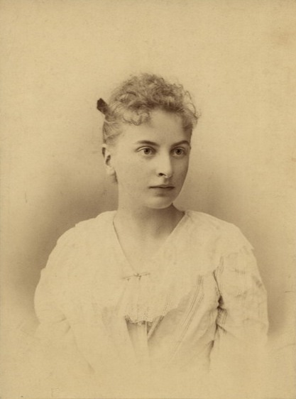 Инесса Арманд в первые годы замужества